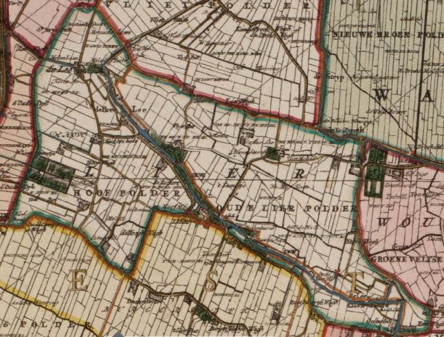 Oude Lier en Hoof polder.